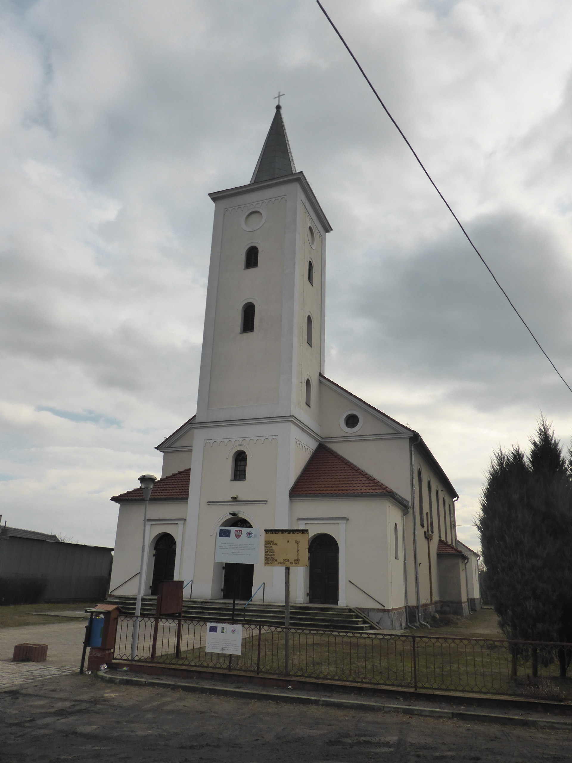 Kościół Najświętszego Serca Pana Jezusa w Jabłonnie